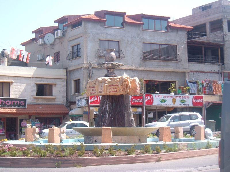 האנדרטה לזכר הרוגי מאורעות אוקטובר 2000 בסח'נין.